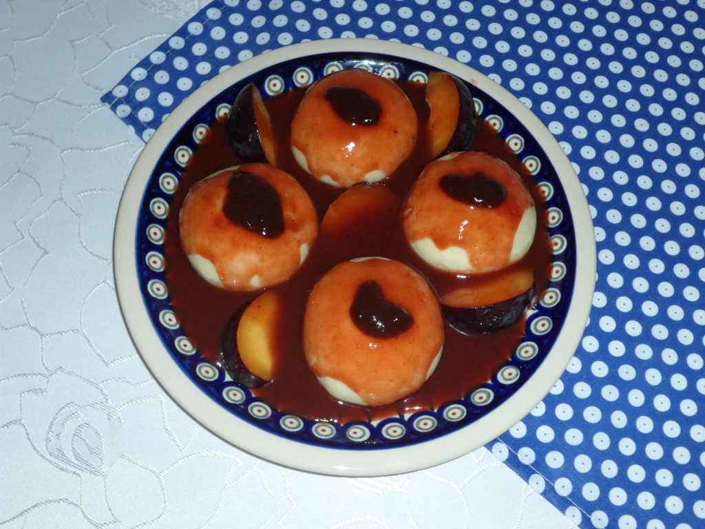 Schläsch: Häwekließla mit Pflaumaschmootsche